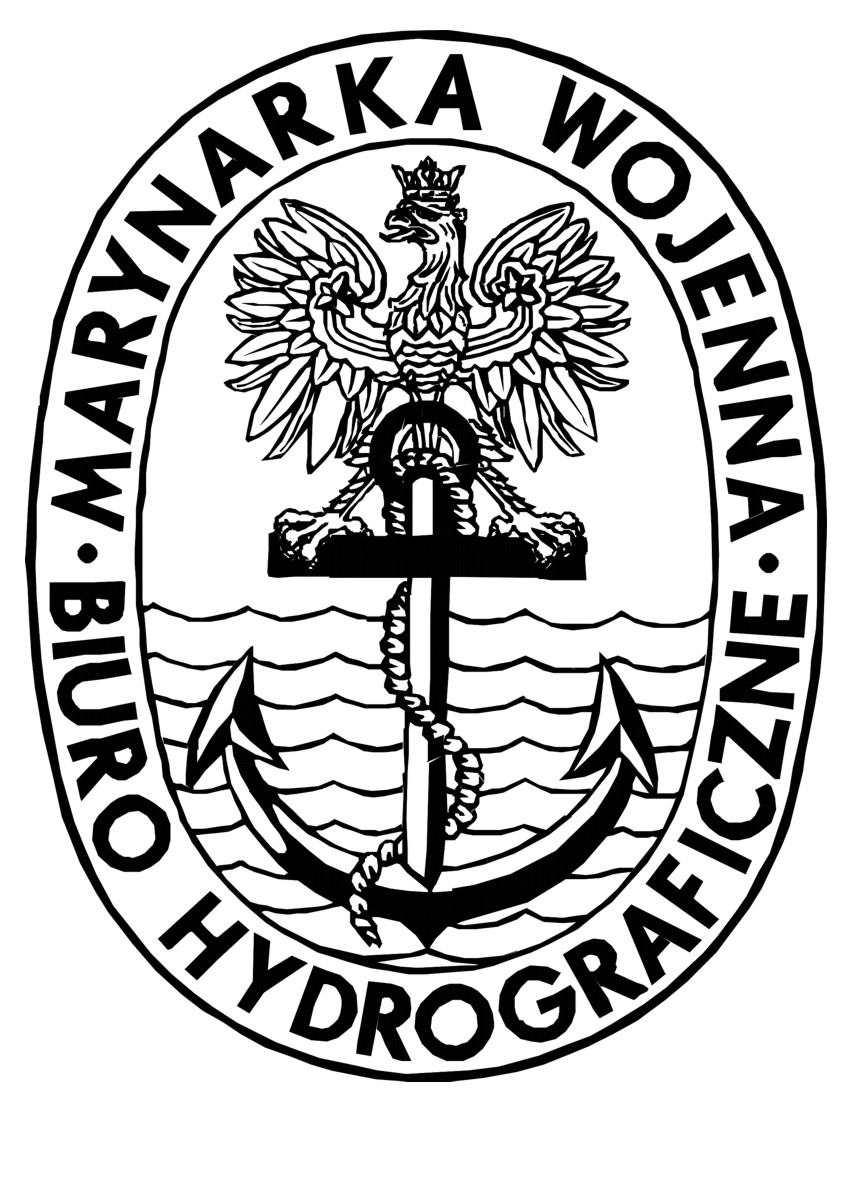 Logo Biura Hydrograficznego Marynarki Wojennej